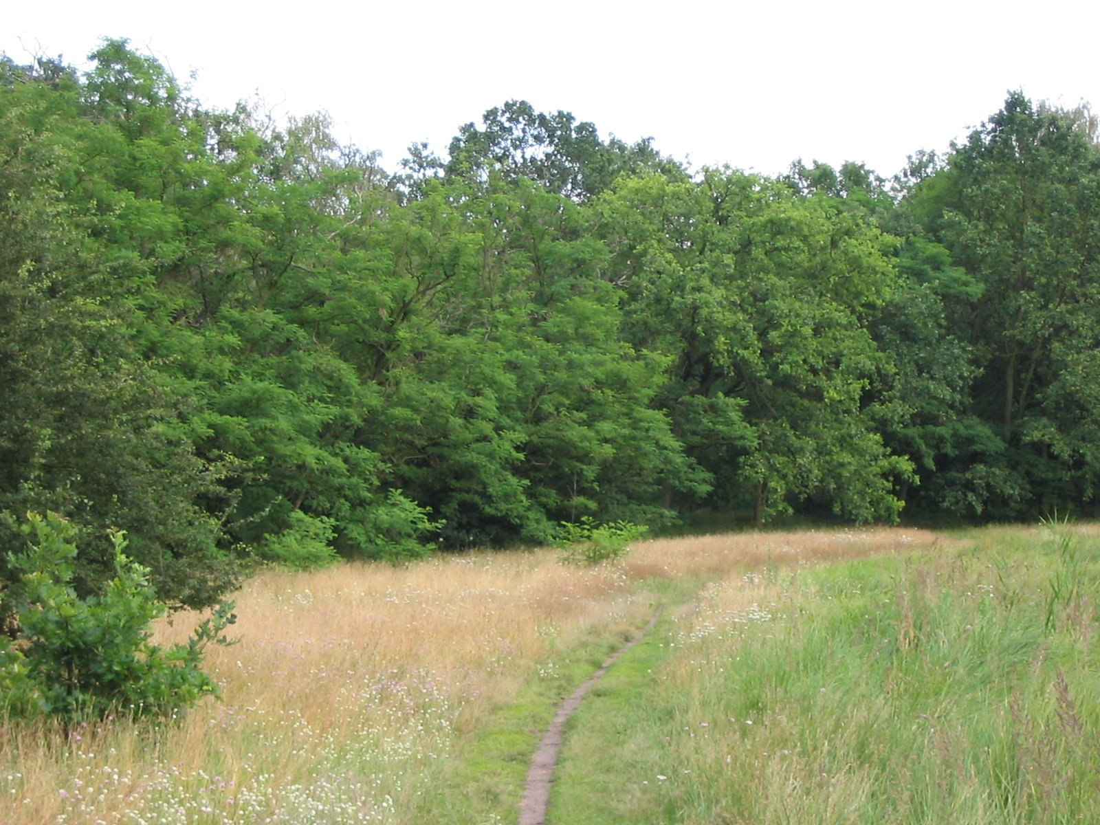 Ein Stück Wald um Luckenwalde, von aussen fotografiert.